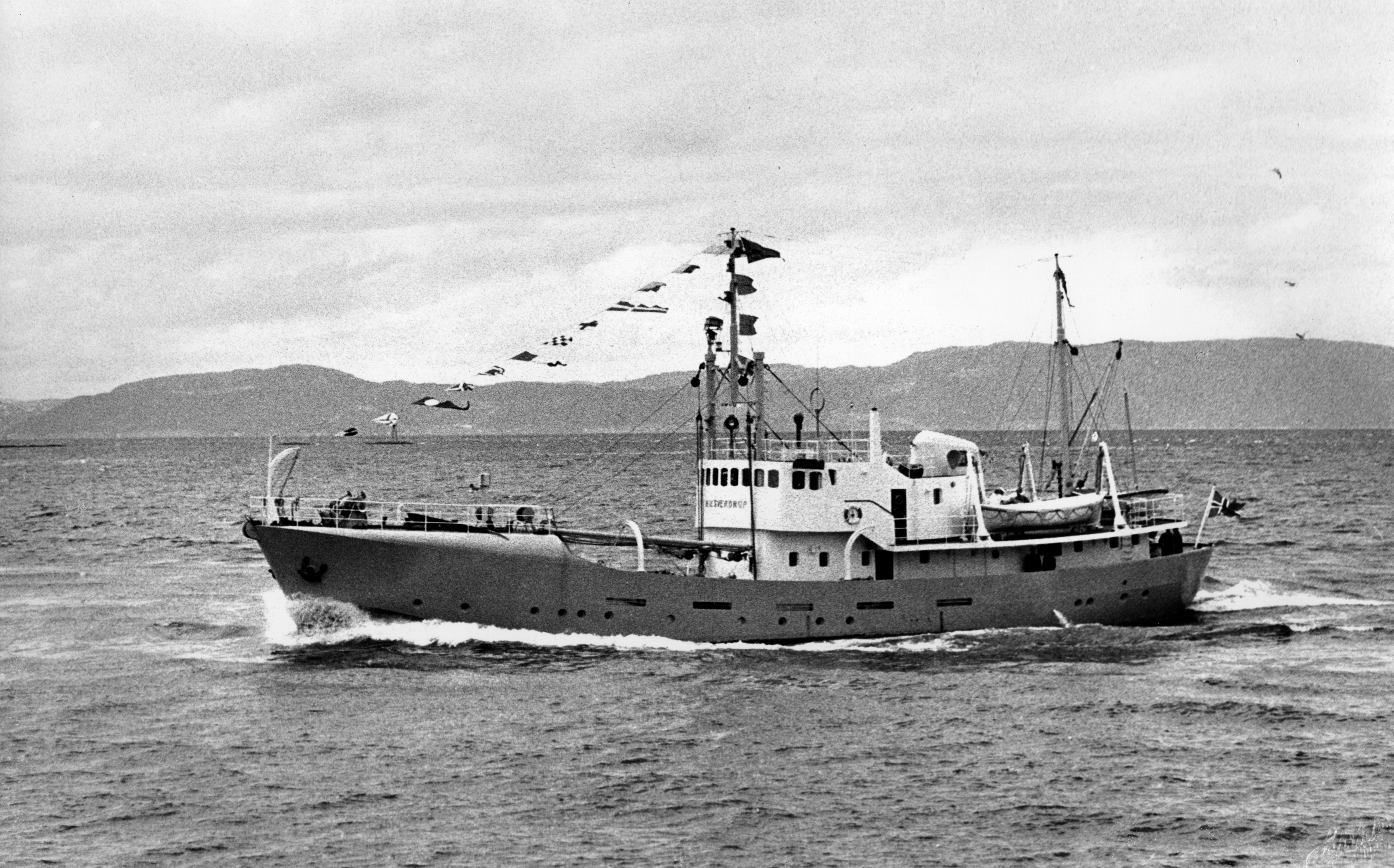 Format: Fotopositiv Dato / Date: 1961 Fotograf / Photographer: Schrøder Sted / Place: Trondheim Eier / Owner Institution: Trondheim byarkiv, The Municipal Archives of Trondheim Arkivreferanse / Archive reference: Tor.H46.B05.F22910 Merknad: Privatarkiv etter Laurits Olav Moxnes (1889 - 1975) donert Byarkivet av Ragnhild M. Steineke (2013) Tekst bak fotoramme: "Vennlig hilsen til "Bergen", Trondheim 13/5 1961 - Olav Moxnes"